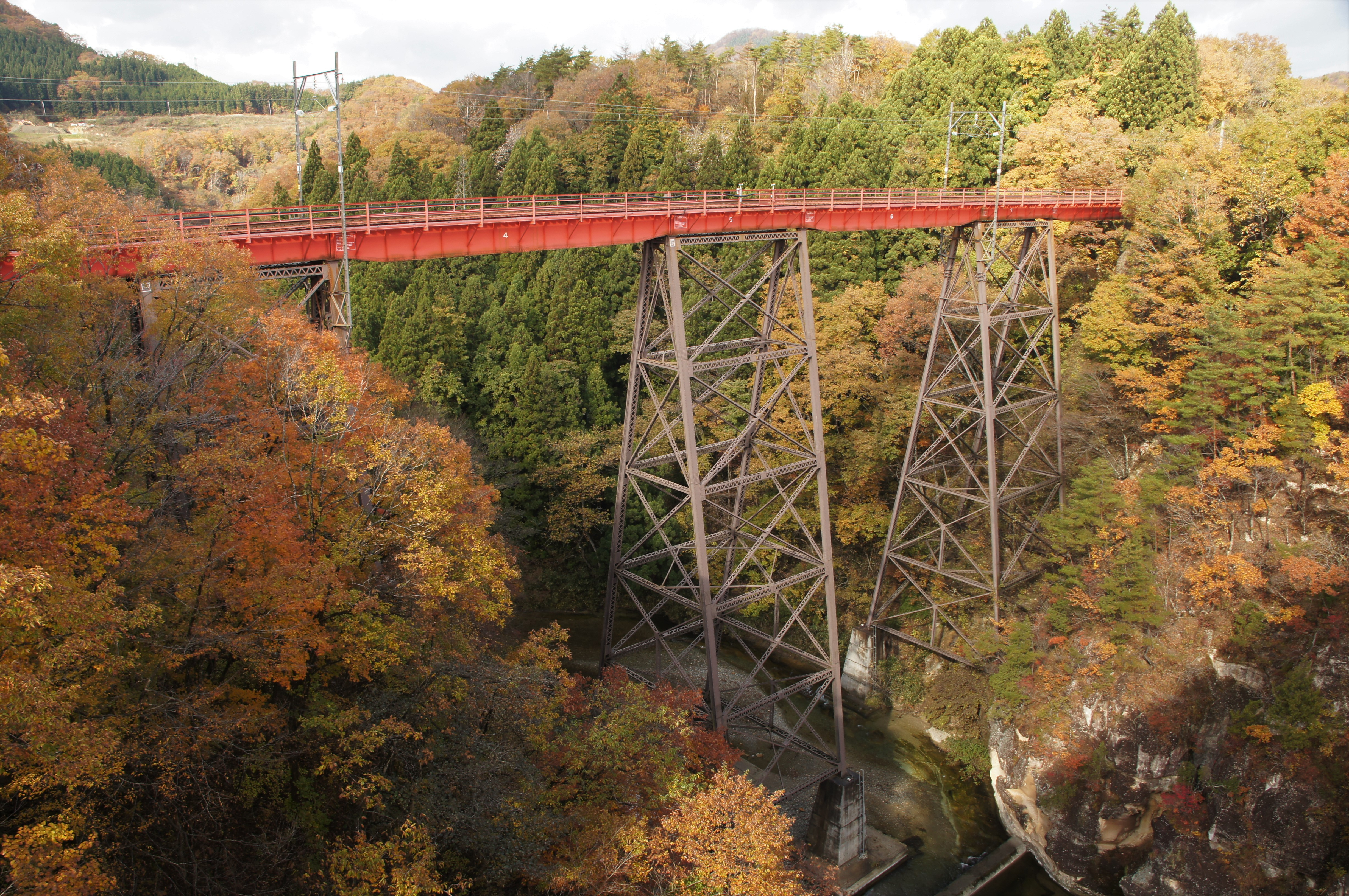 第二広瀬川橋梁を国道４８号の熊ヶ根橋から撮影したもの。